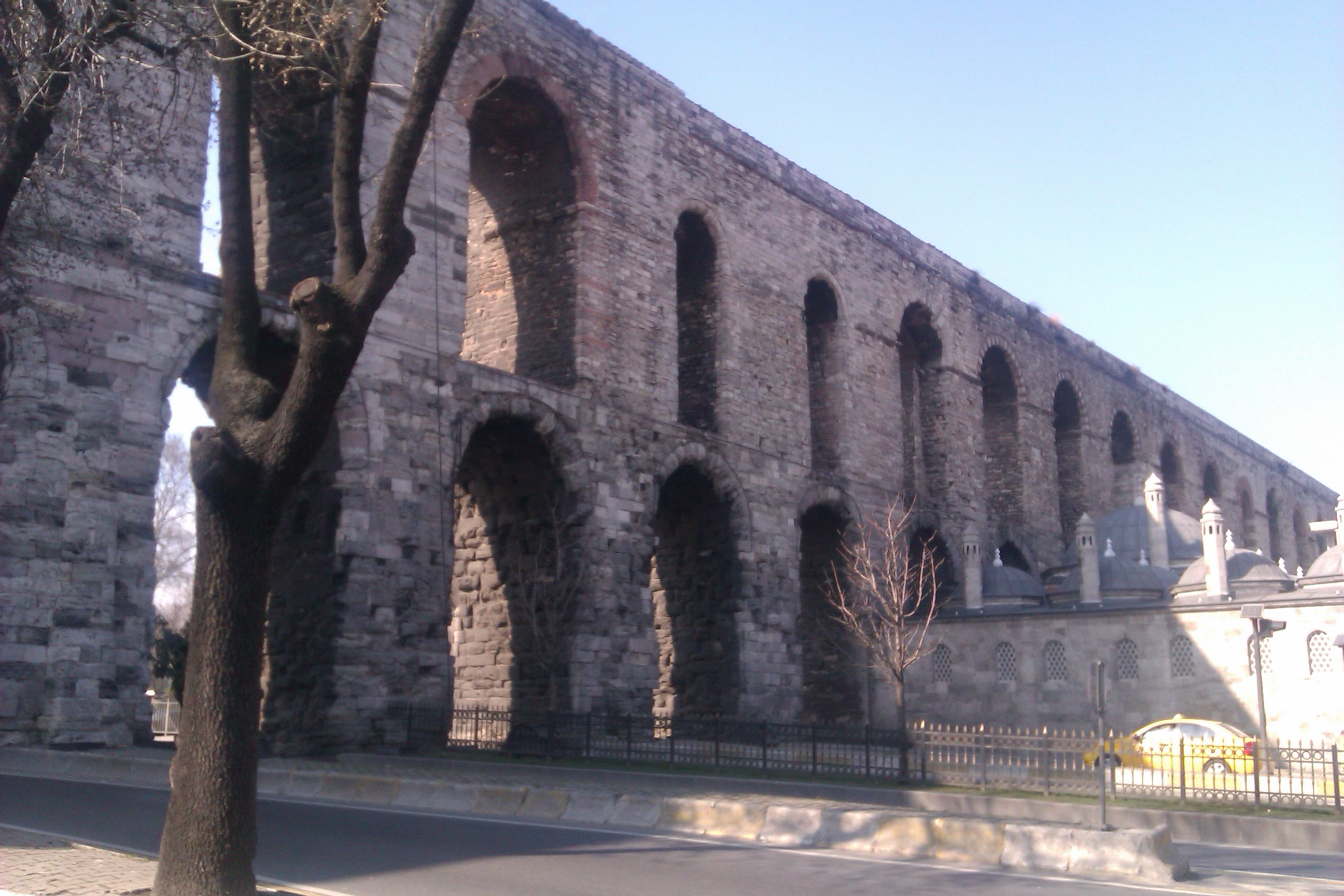 Hadrianus Bozdoğan Kemeri 4